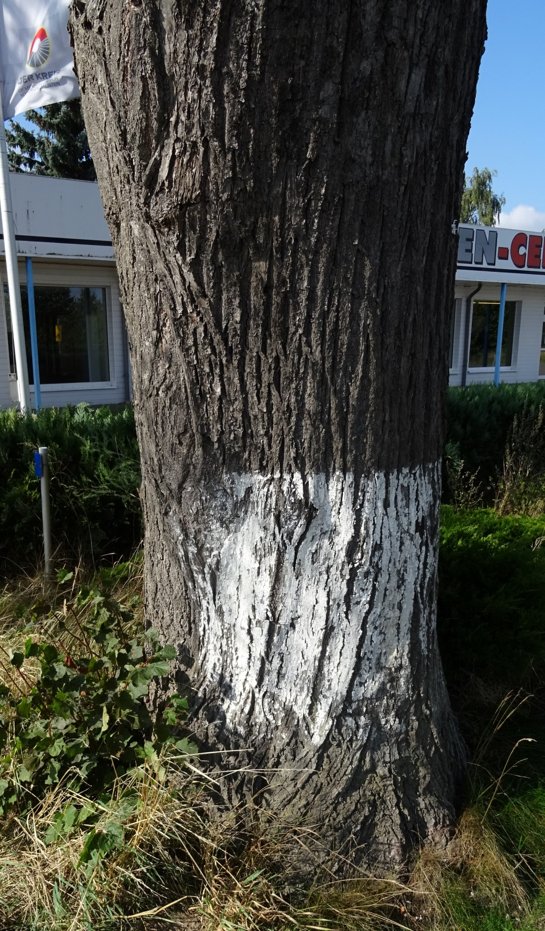 Ein älterer Baumspiegel in Friedland (Mecklenburg-Vorpommern).